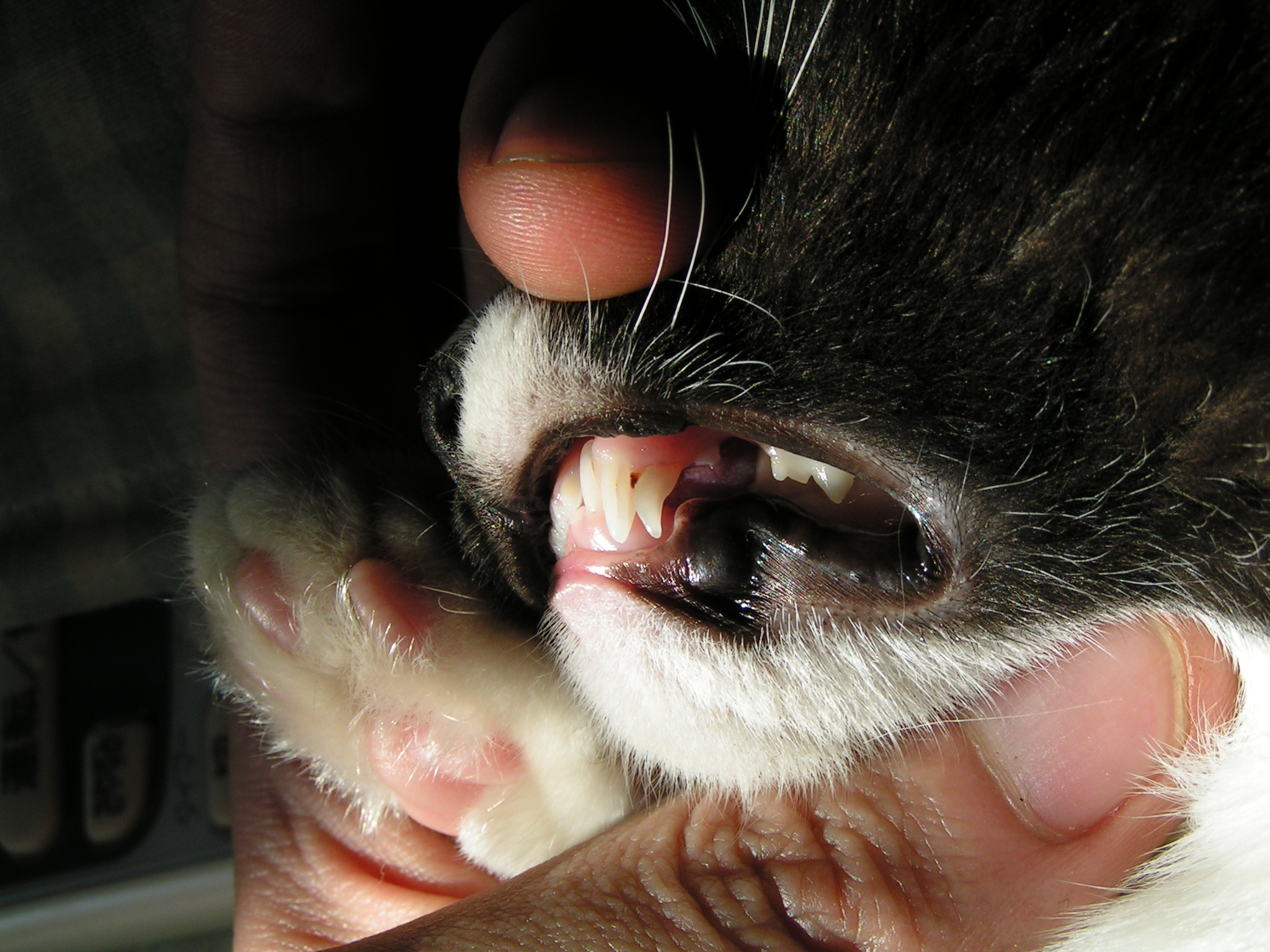 乳歯から永久歯への生え変わり